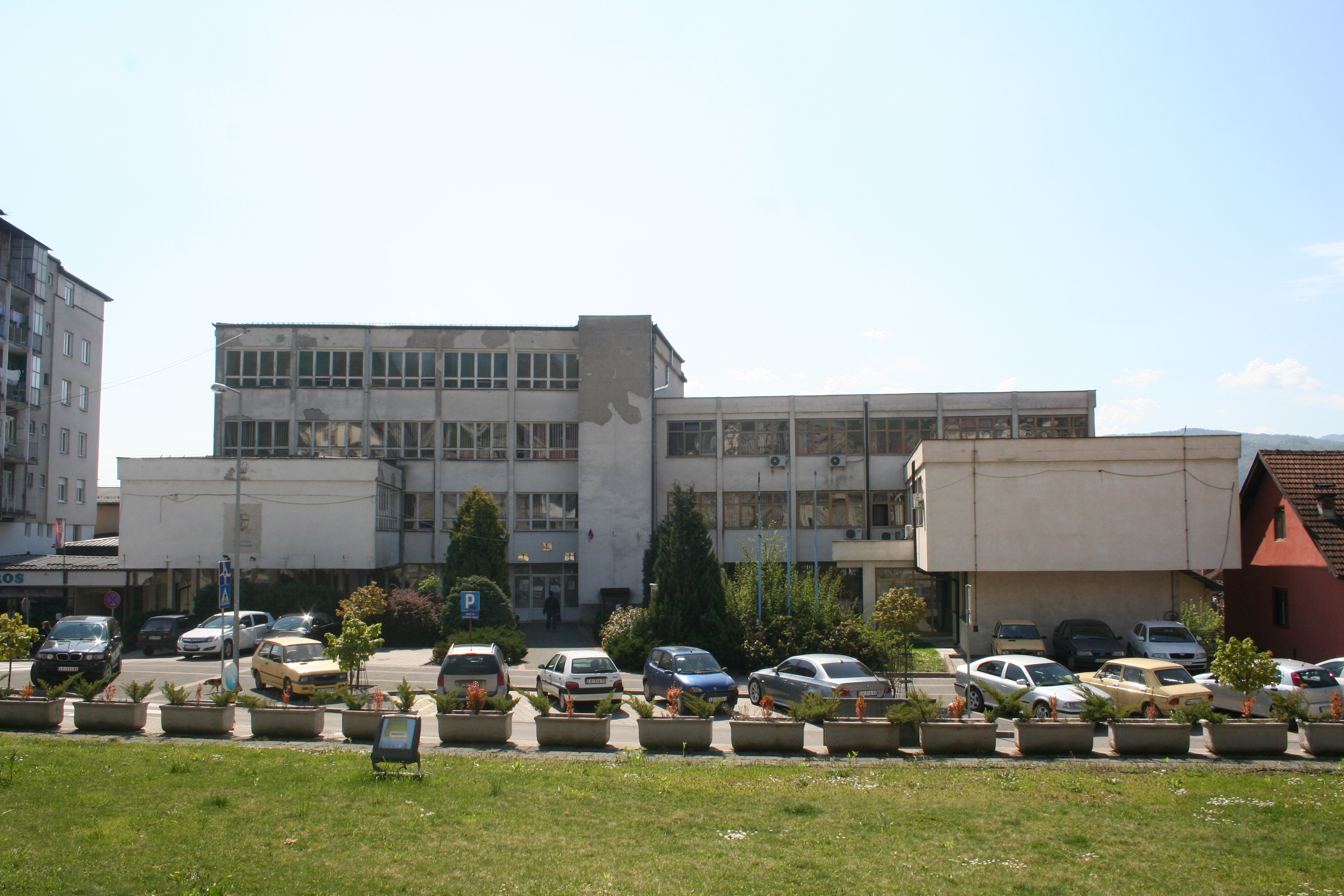 Ljubovija